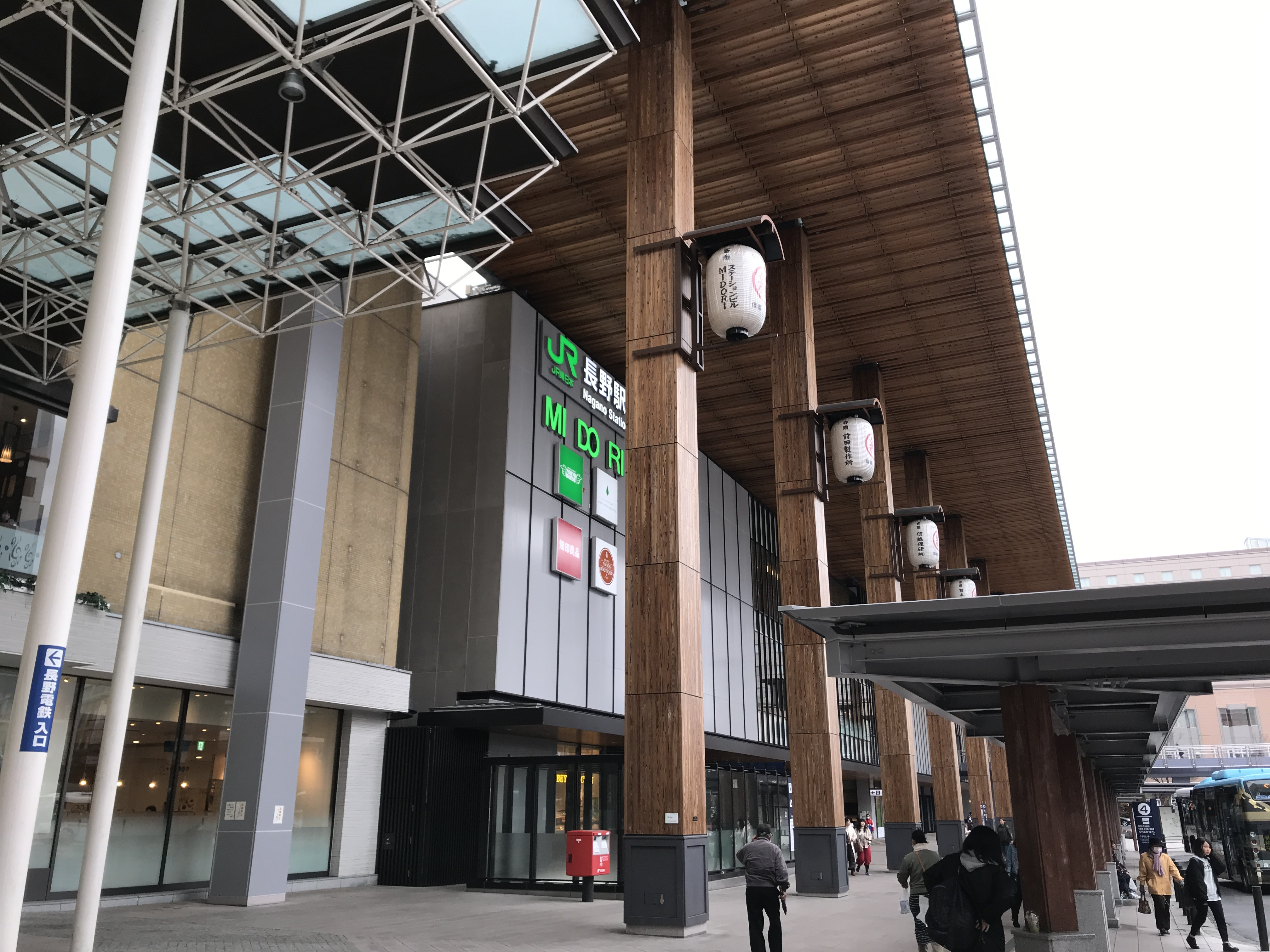 長野駅のJR及びMIDORIの看板